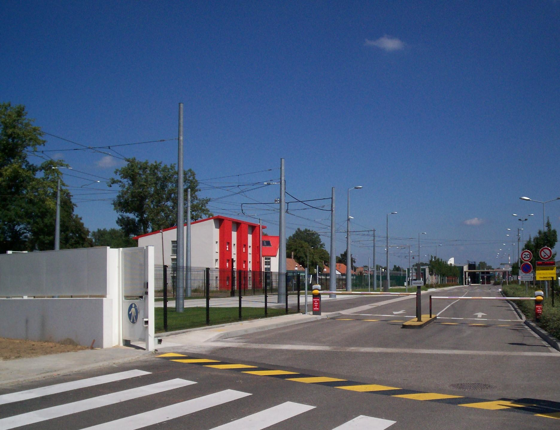 Tramway de Strasbourg Nouveau dépôt Bus-Tram à Kibitzenau, le 26 Août 2007, jour de l'inauguration de l'extension du réseau Tramway Strasbourgeois